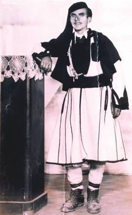 Зетьовска носия, Долни Дримкол, село Дренок, 20-те години на XX век.))